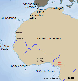 ==Periplo de Hannon==